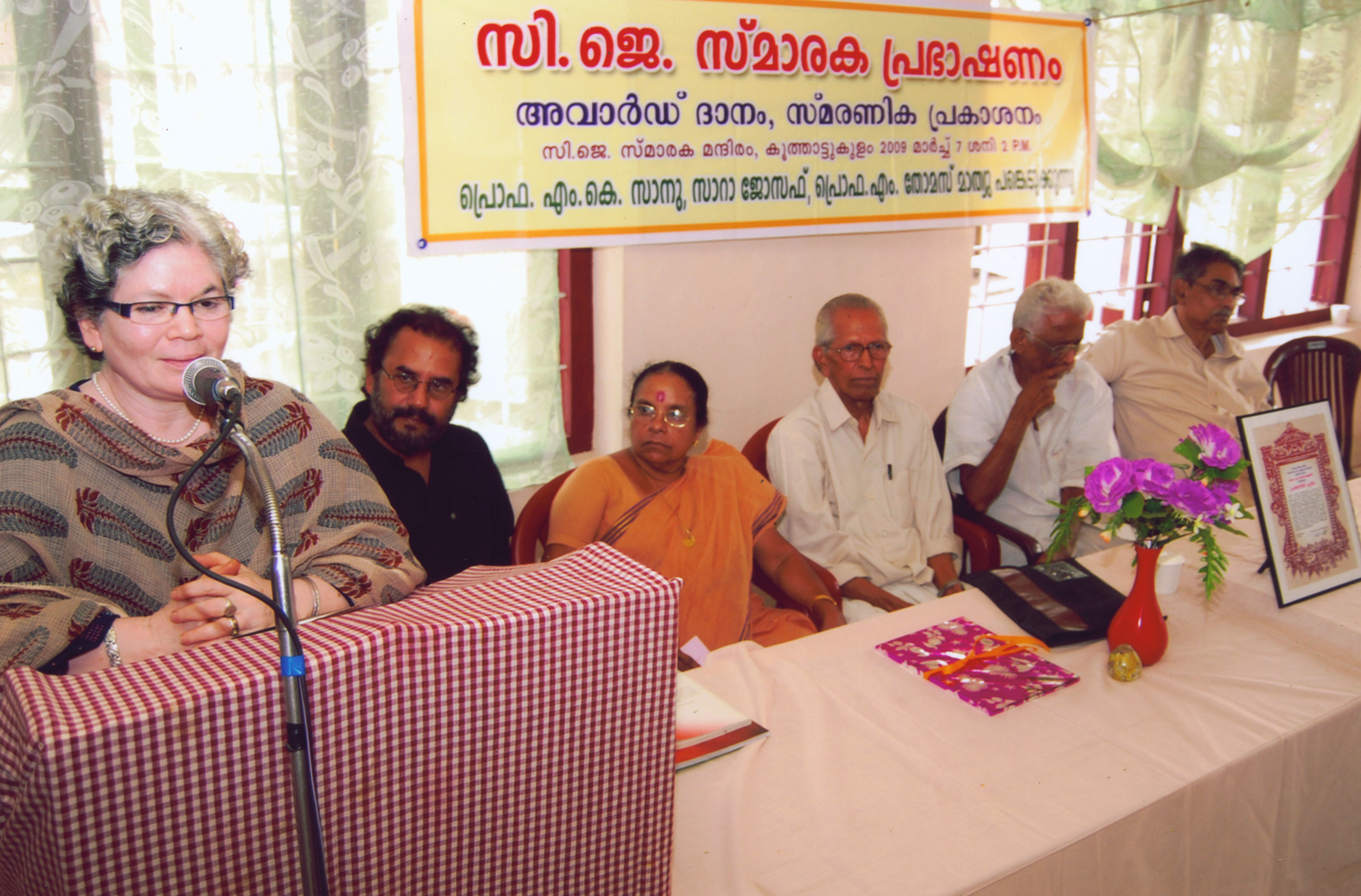 സി ജെ സ്മാരക പ്രസംഗം - 2009